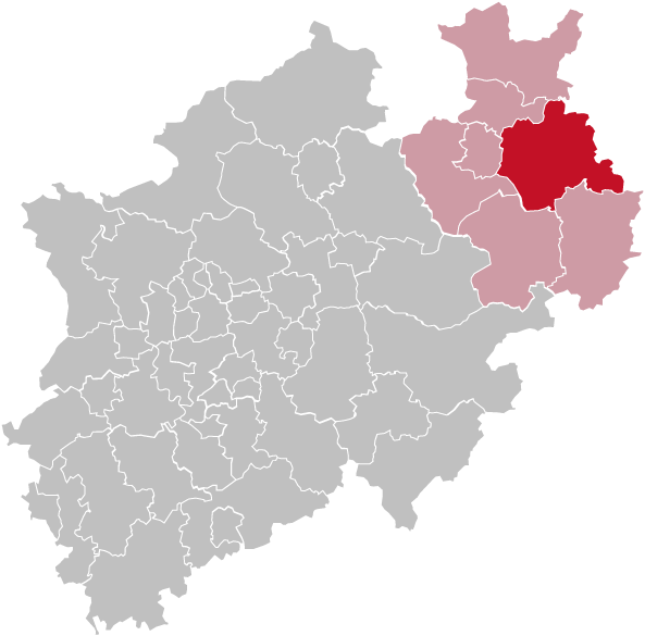 Karte Nordrhein-Westfalens mit dem Kreis Lippe